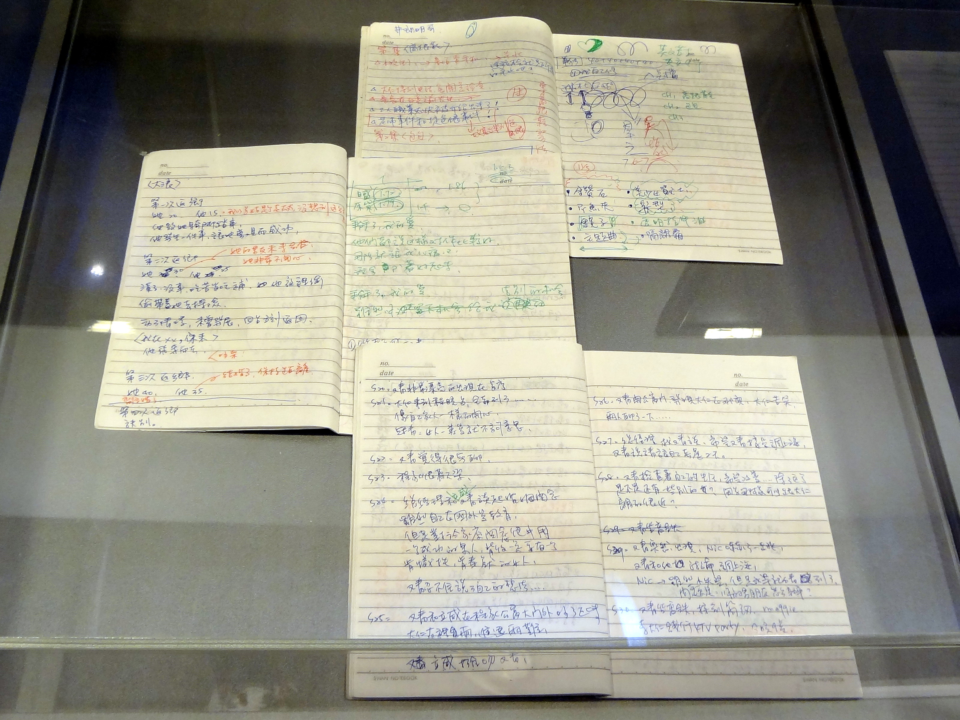 松山文化創意園區「金鐘五十．響」特別展展示品：編劇徐譽庭提供的八大電視偶像劇《我可能不會愛你》劇本手稿。